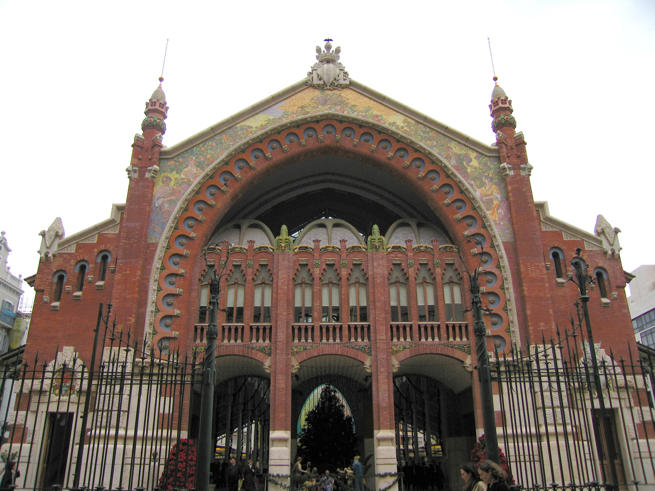 Façana del Mercat de Colom, c/Jorge Juan (València)